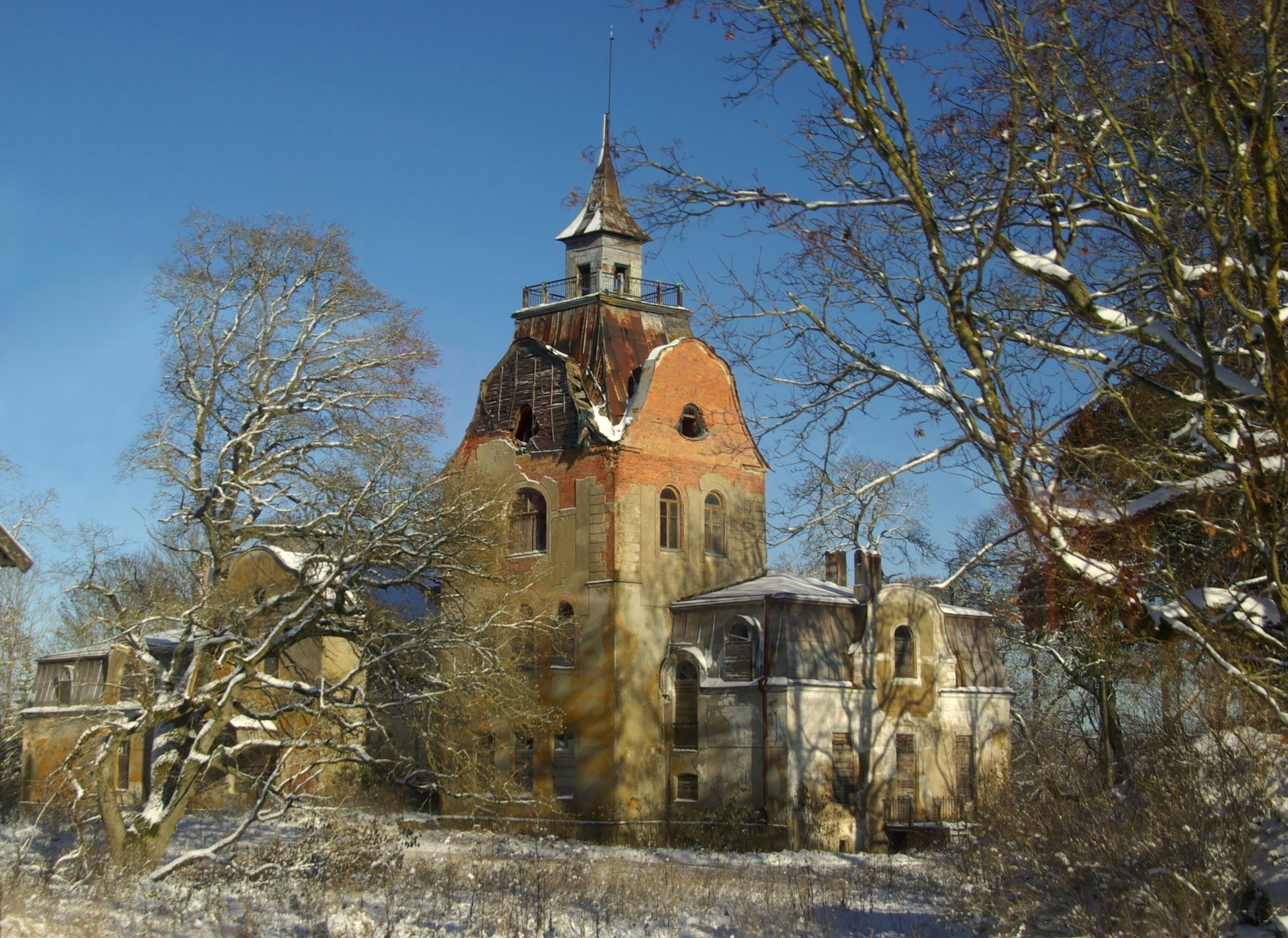 Lääne-Viru maakond, Kadrina vald, Neeruti küla